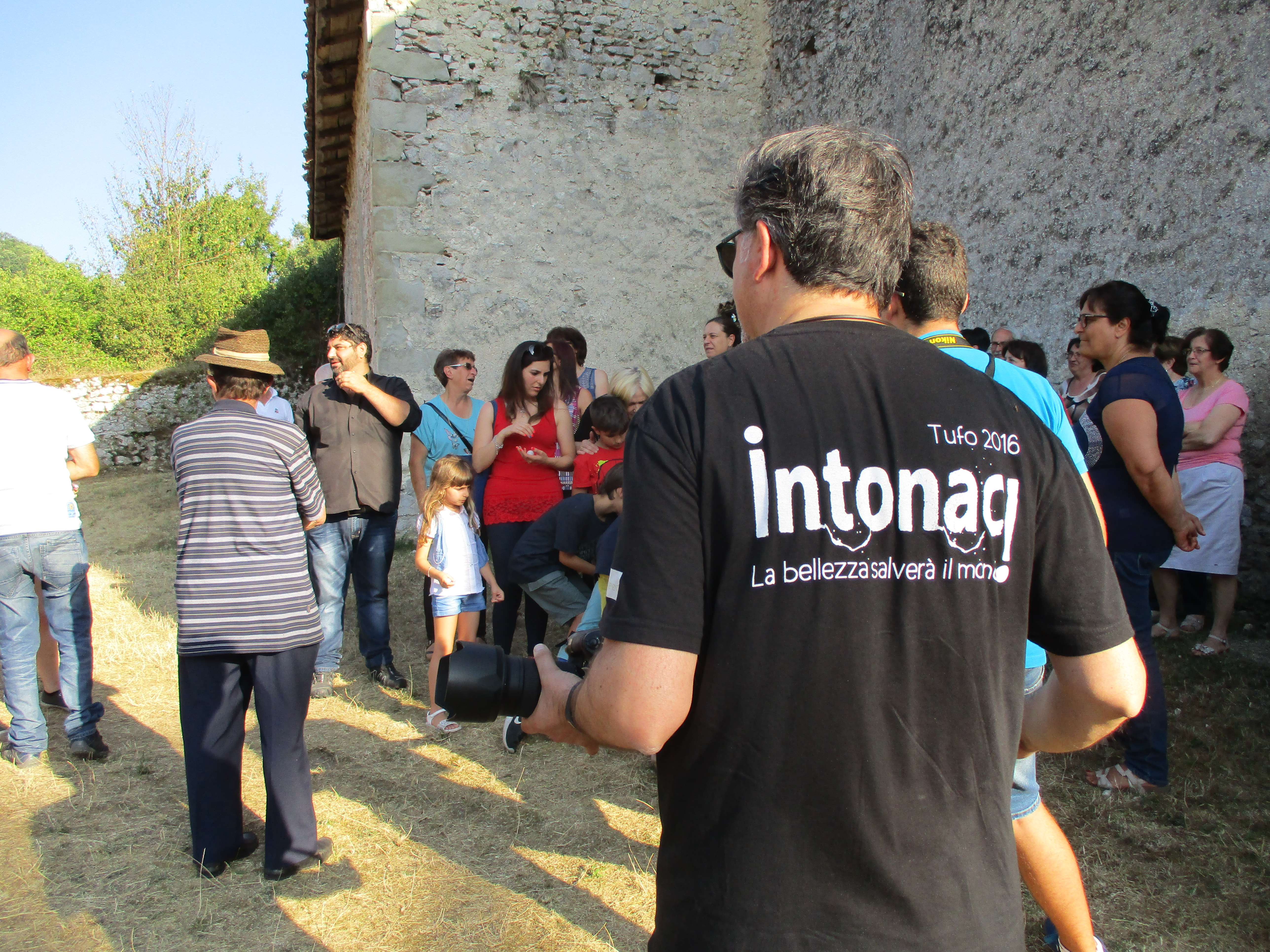 Intonaci: incontro con gli artisti a Tufo di Carsoli